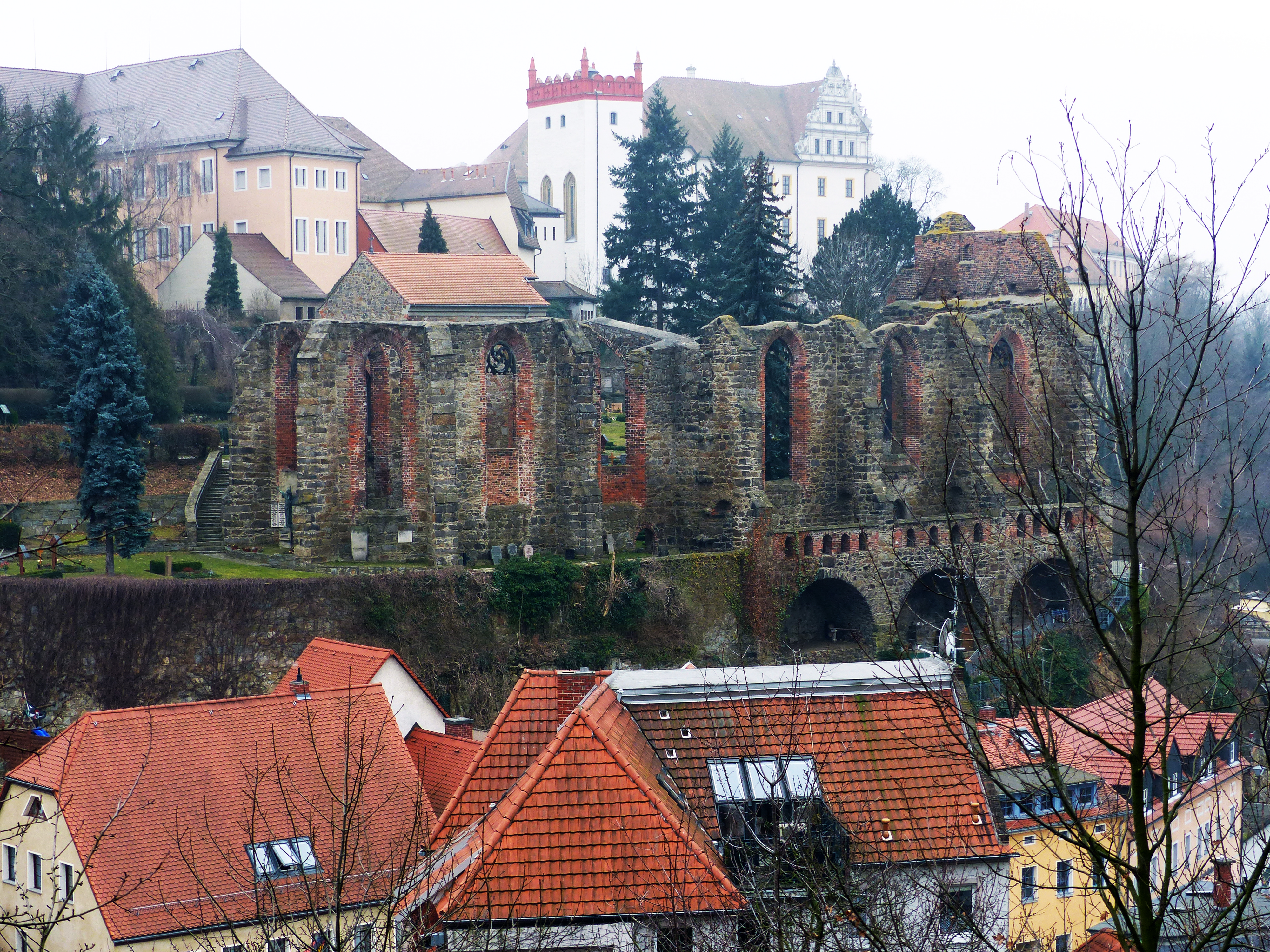 Ruine der St.-Nikolai-Kirche, Bautzen Hornjoserbsce: Ruina Mikławskeje cyrkwje w Budyšinje.